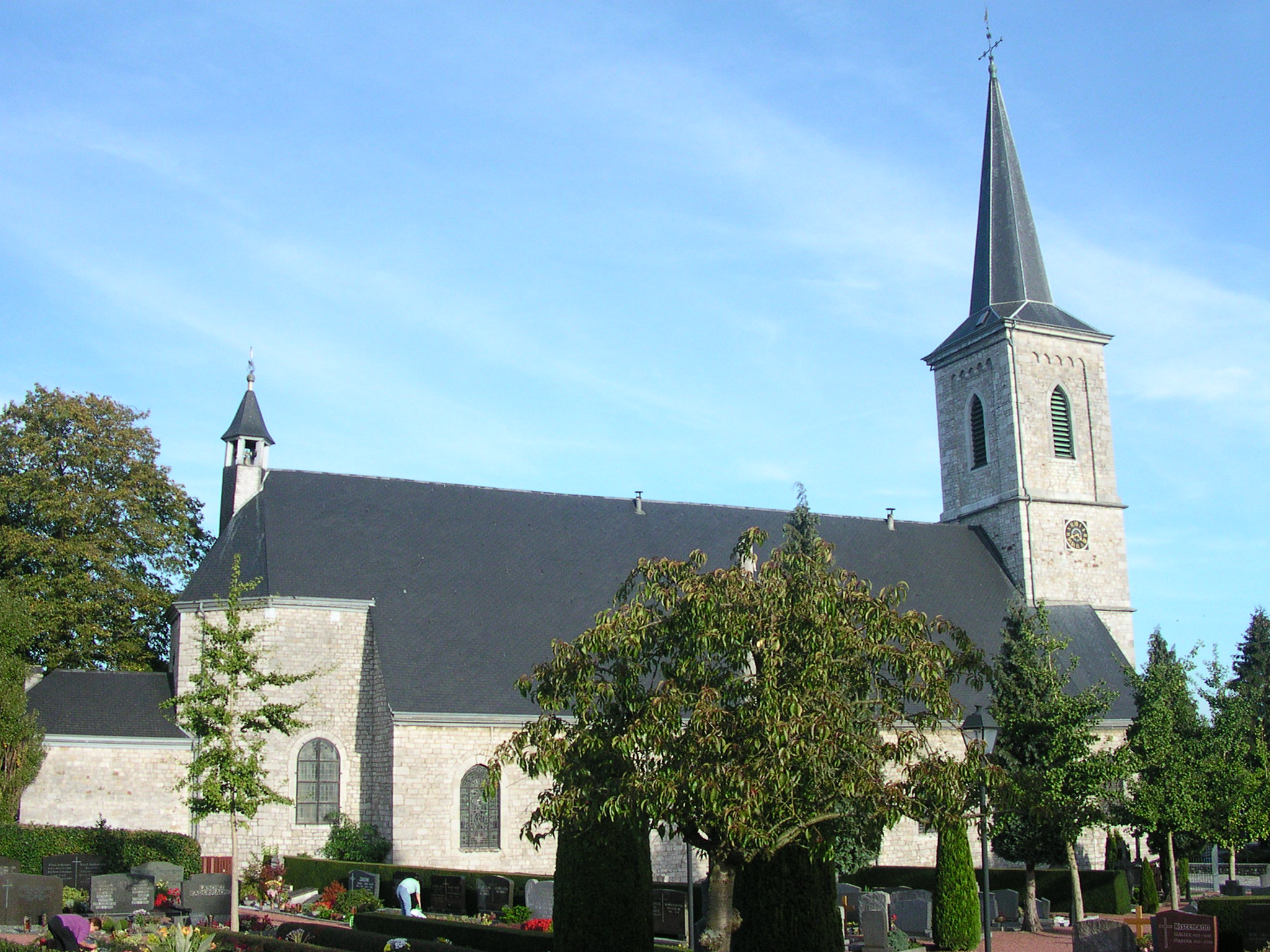 Raeren, Sankt Nikolaus Kirche